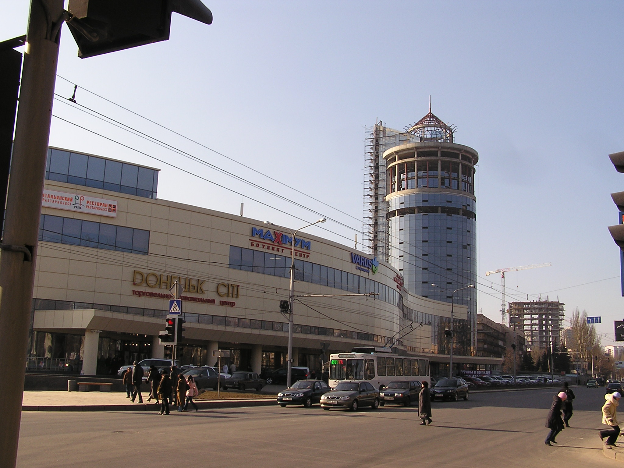 Донецк. Торгово-развлекательный центр «Донецк-Сити».